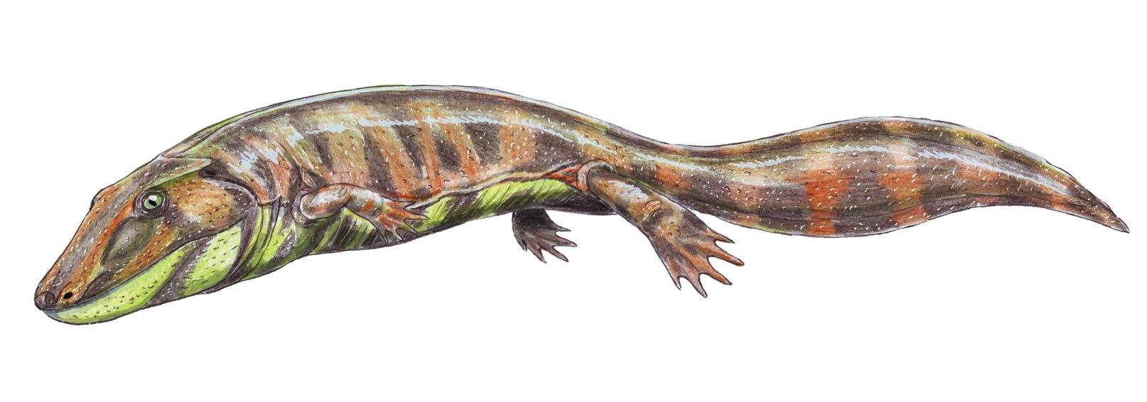 Loxomma